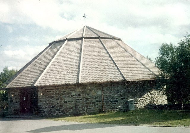 Røros kapell